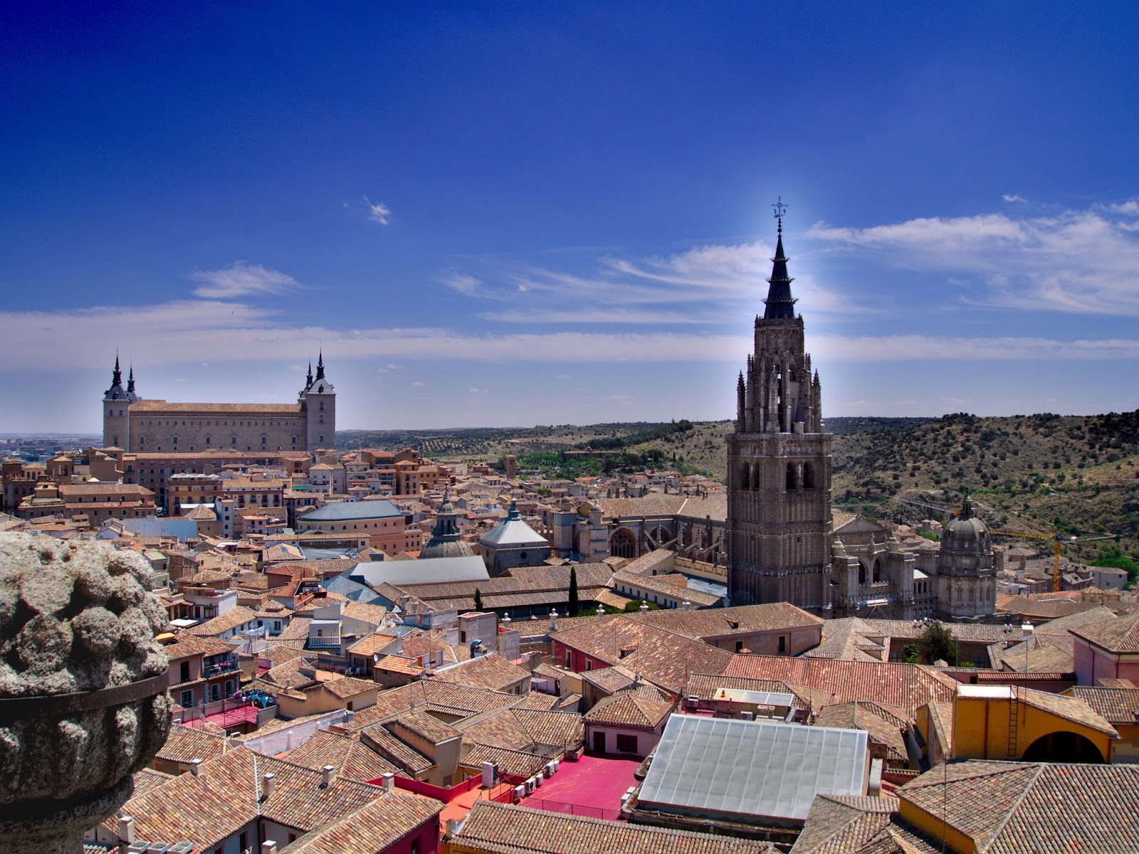 Vista del nucli històric de la ciutat de Toledo. Al fons esquerre s'aprecià l'Alcàsser i més a prop a la dreta la catedral de la ciutat.